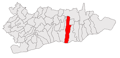 Categorie:Hărţi ale judeţului Călăraşi